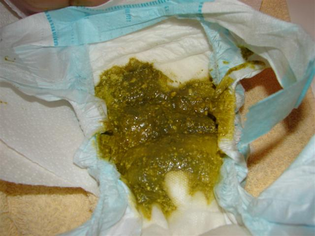 kaka in babypamper